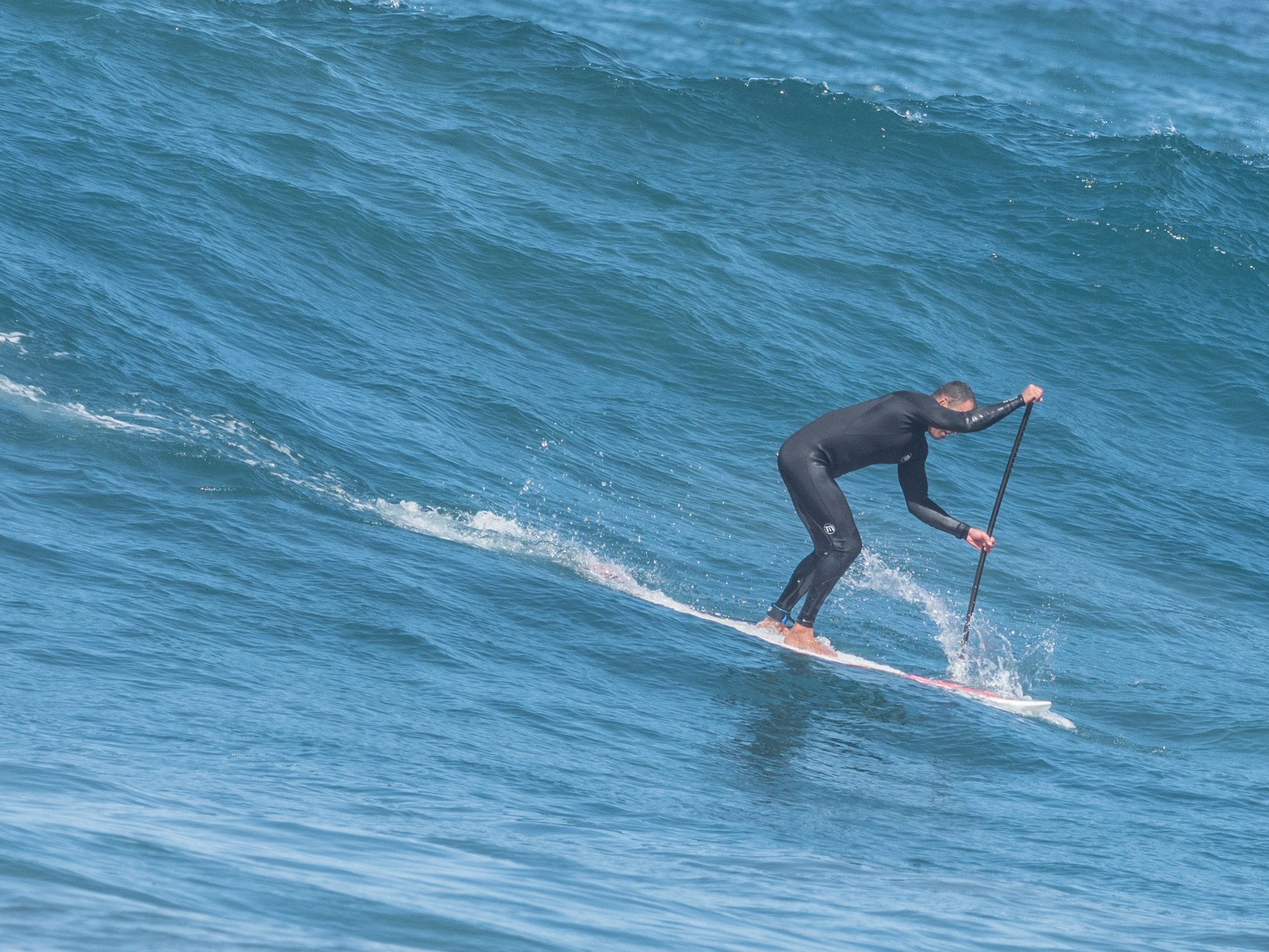 Playa de Las Canteras, Las Palmas, Gran Canaria, February 2018